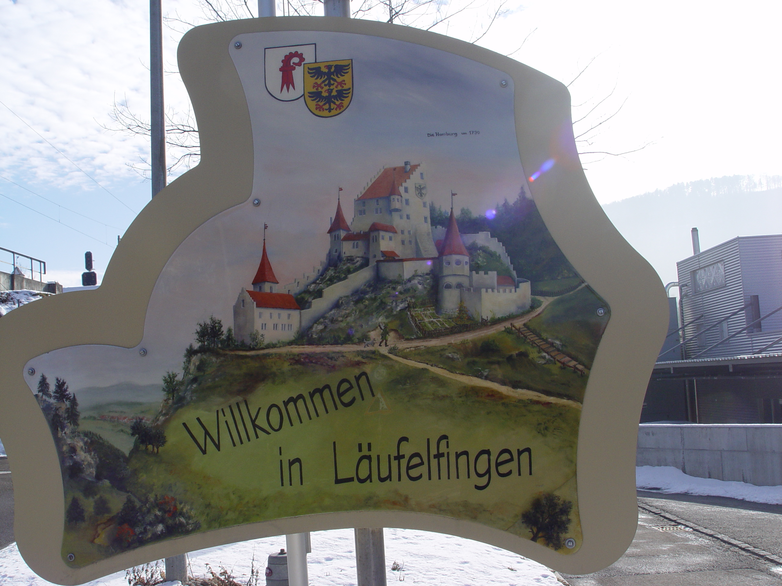 Strassenschild vor Läufelfingen im Kanton Basellandschaft Schweiz